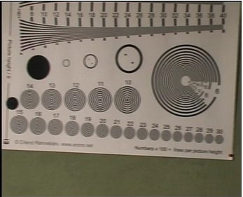 Compresión realizada con el códec MPEG4.